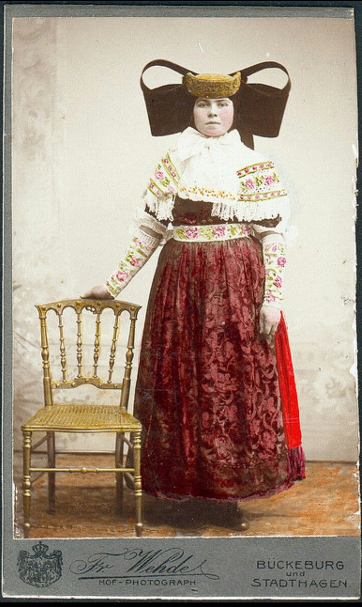 Kabinettfotografie im des Hoffotografen Friedrich Wehde mit Sitz in Stadthagen und Bückeburg, hier eine handkolorierte Aufnahme mit einer jungen Dame in Bückeburger Tracht, mit einer Hand an einem Stuhl stützend. Der Kartonträger für das Bildmaterial wurde zum Einschieben in ein Fotoalbum grob mit einer Schere seitlich angeschnitten ...